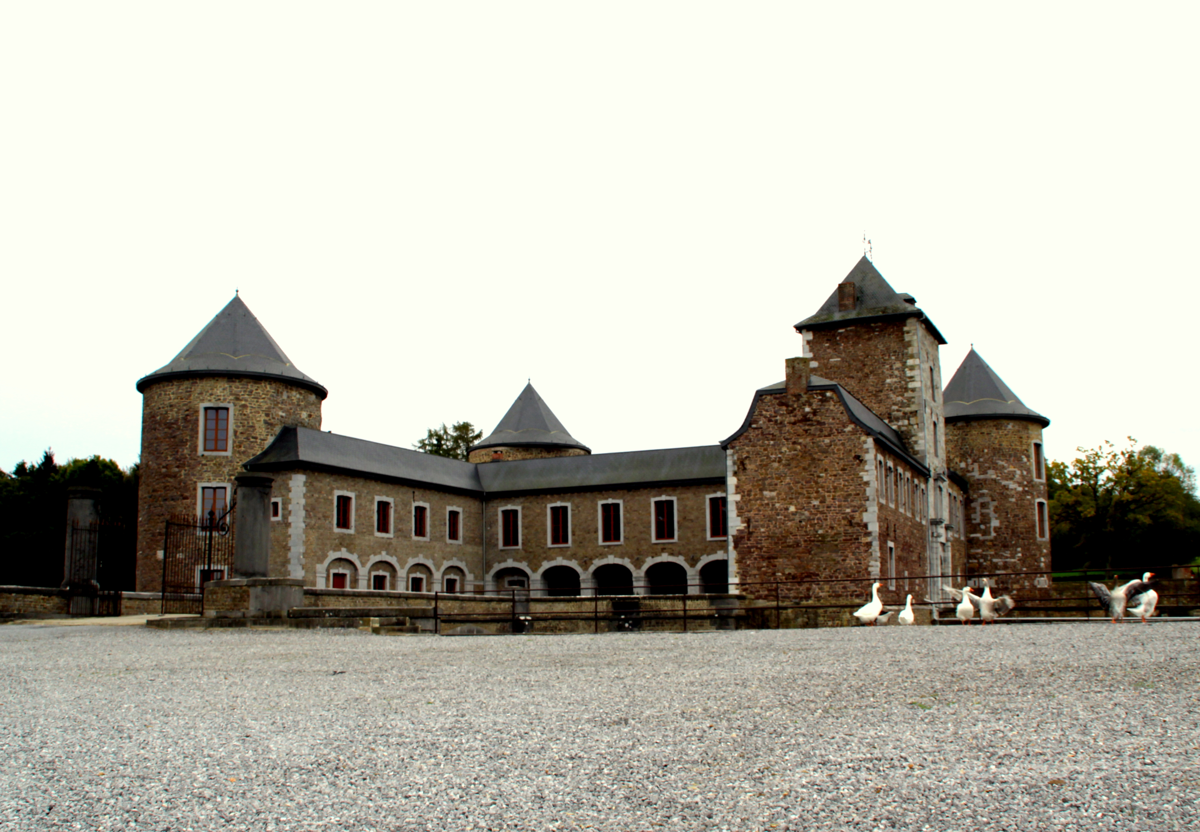 D'Schlass vun Neuville-en-Condroz